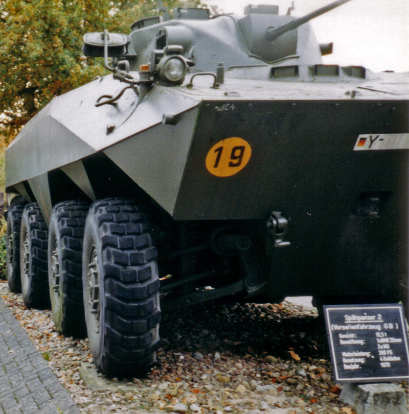 Spähpanzer Luchs (Prototyp/Vorserie), ausgestellt im Panzermuseum Munster